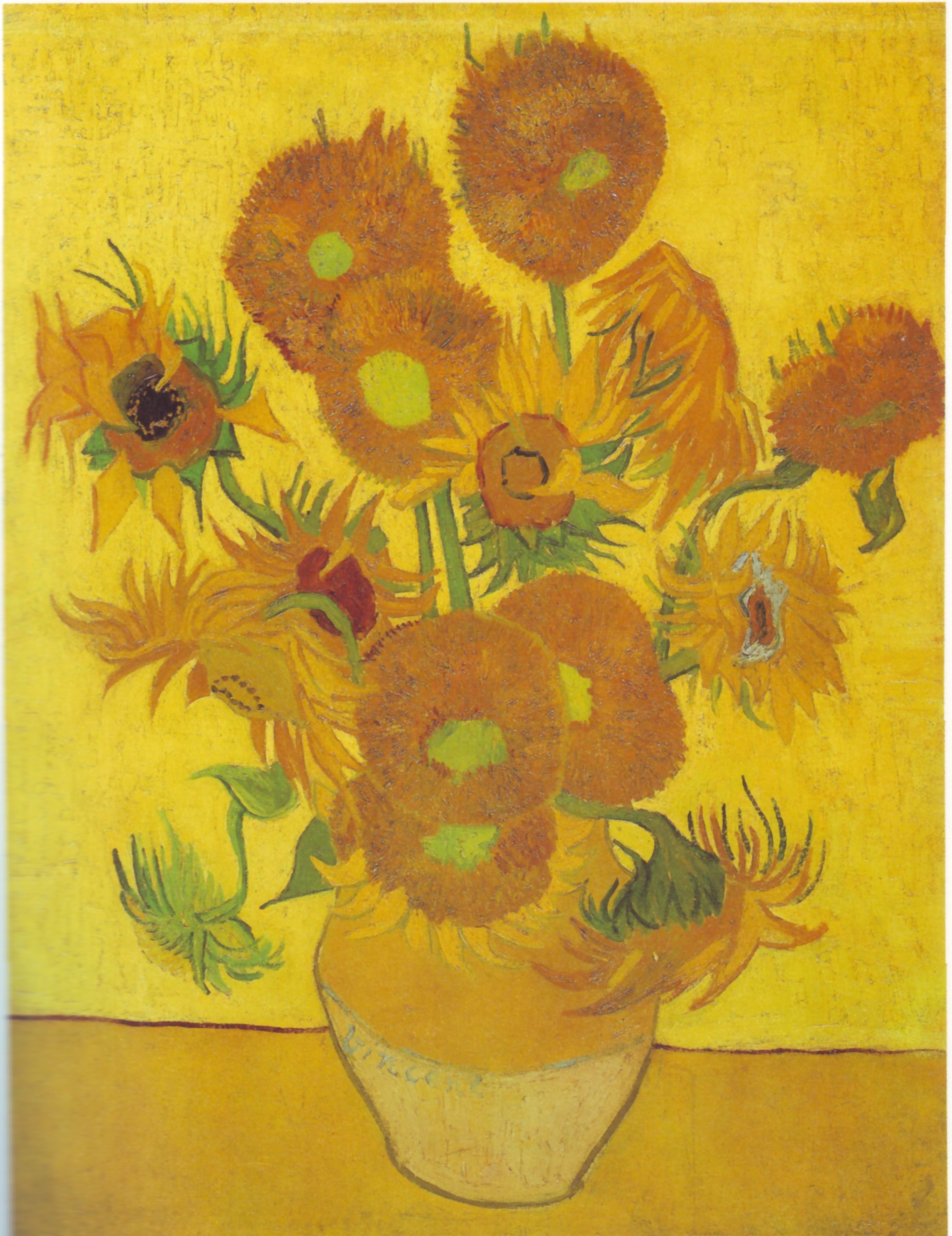 Vincent van Gogh: Sonnenblumen. Arles, 1888 Öl auf Leinwand, 92,5 x 73 cm Vincent van Gogh Stiftung/National Museum Vincent van Gogh, Amsterdam